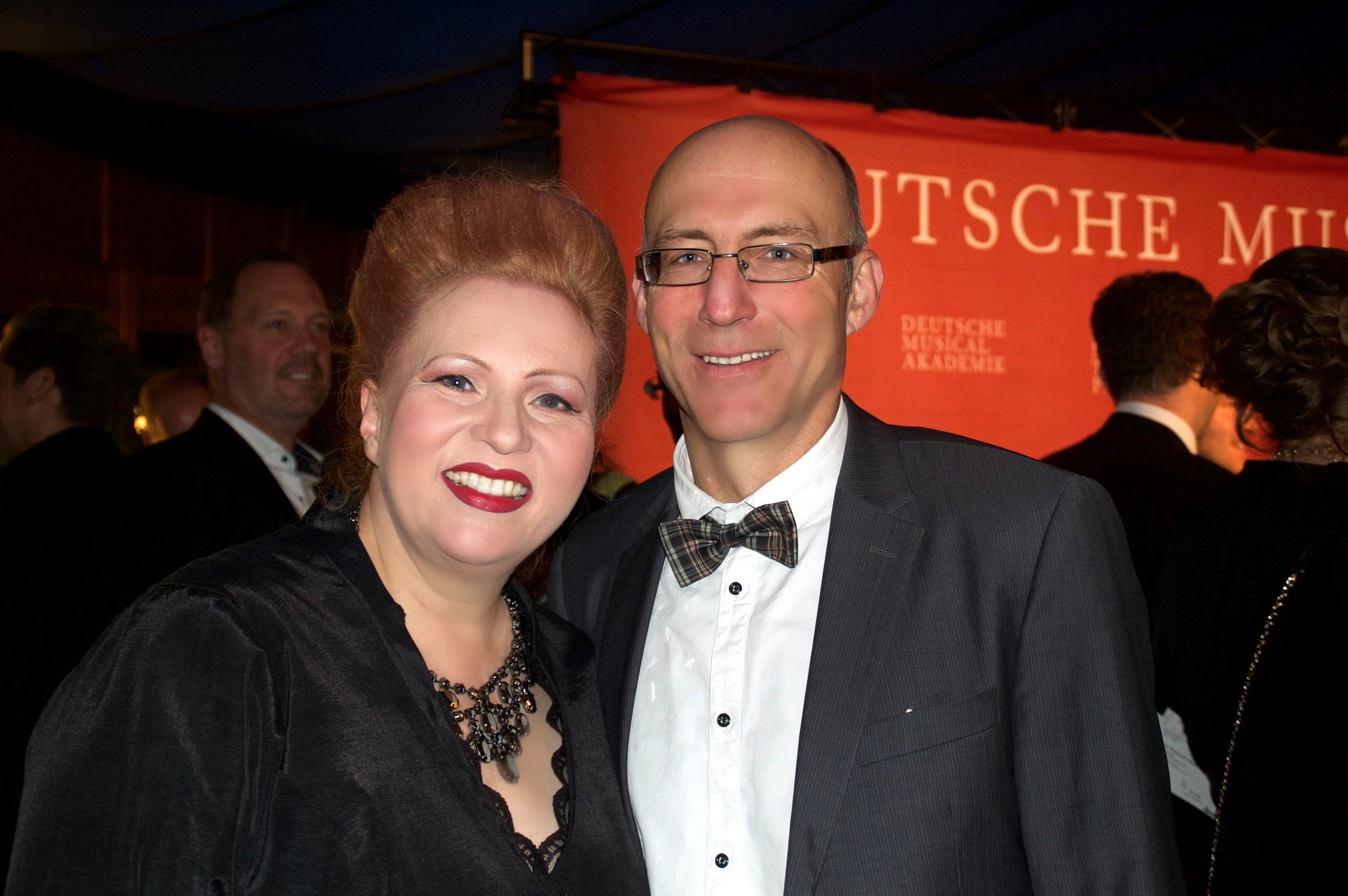 Die Schauspielerin Bettina Meske und der Schriftsteller Ewald Arenz bei der Verleihung des Deutschen Musical Theater Preises in Berlin, Oktober 2016